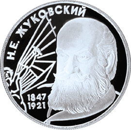 Монета Банка России — Серия: «Выдающиеся личности России», 150-летие со дня рождения Н.Е. Жуковского, 2 рубля, реверс.